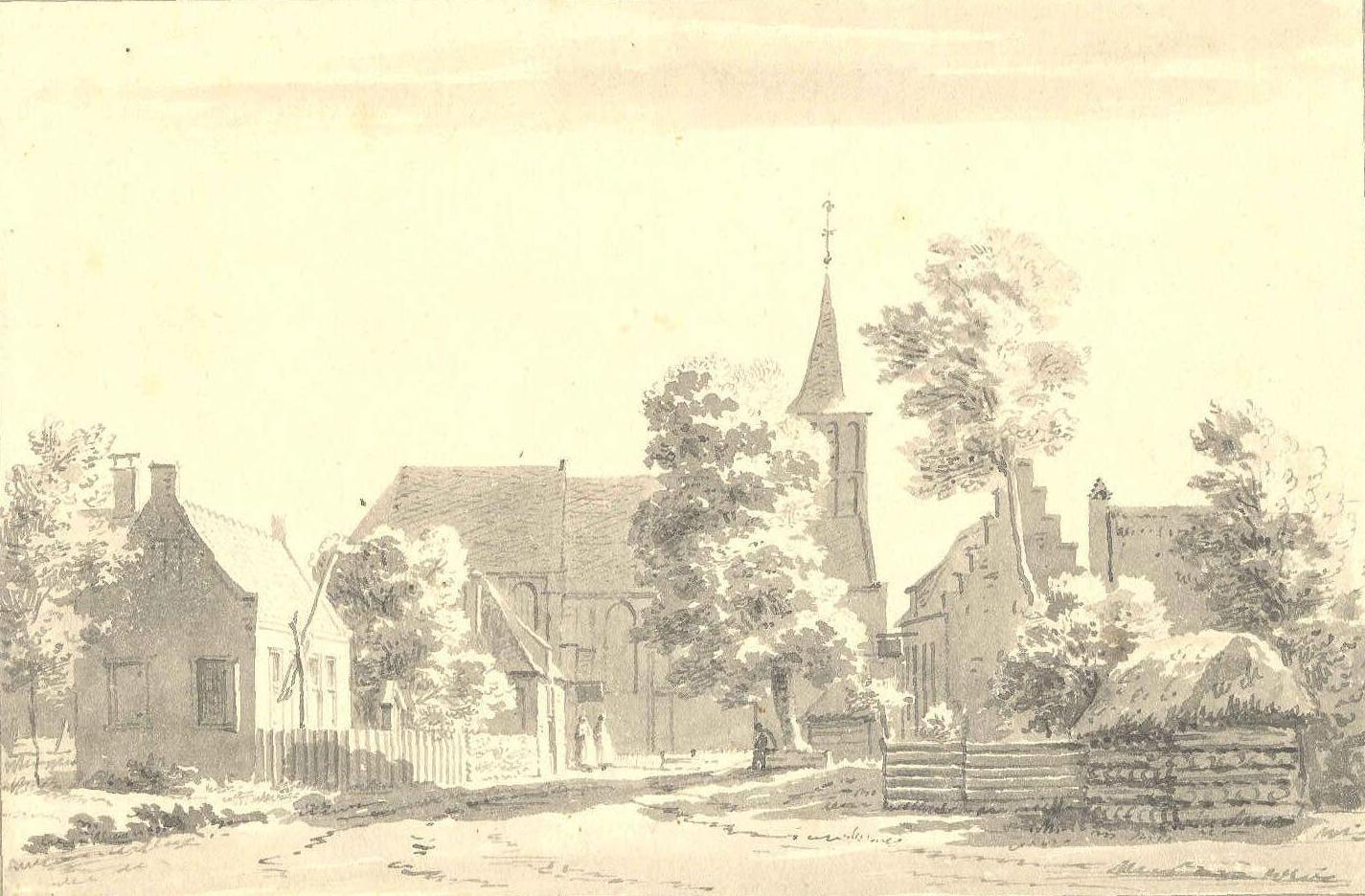 Cornelis Pronk 1732 Gewassen Pentekening Sint-Lambertuskerk Kerk-Avezaath